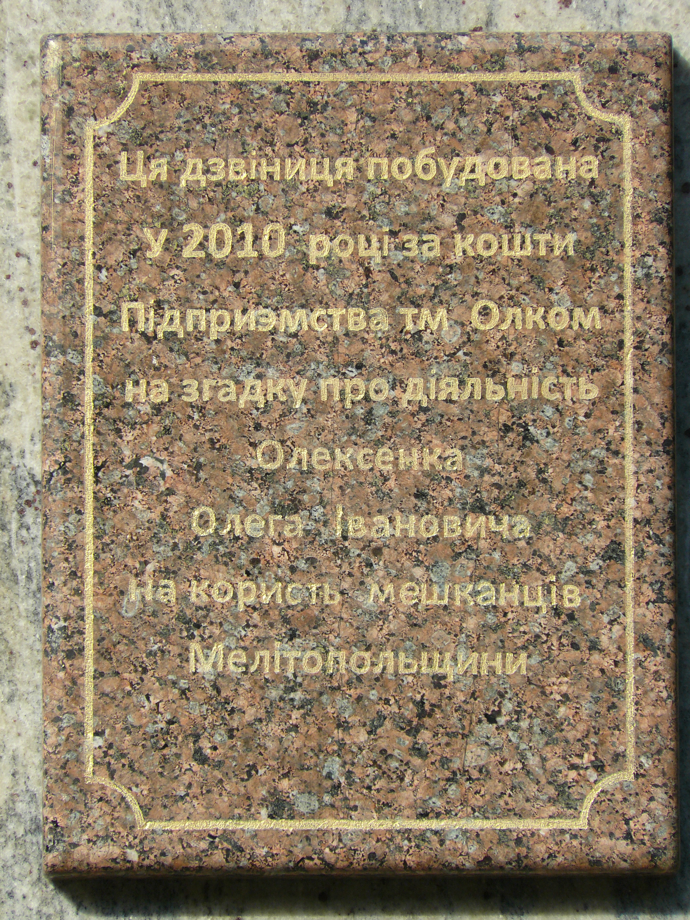 Табличка на звоннице храма Кирилла и Мефодия, Мелитополь